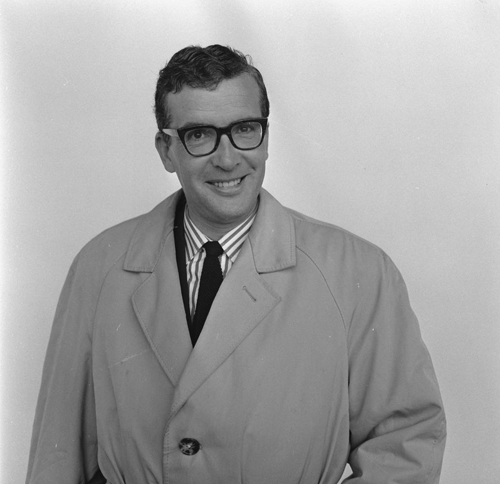 Joop Smits.